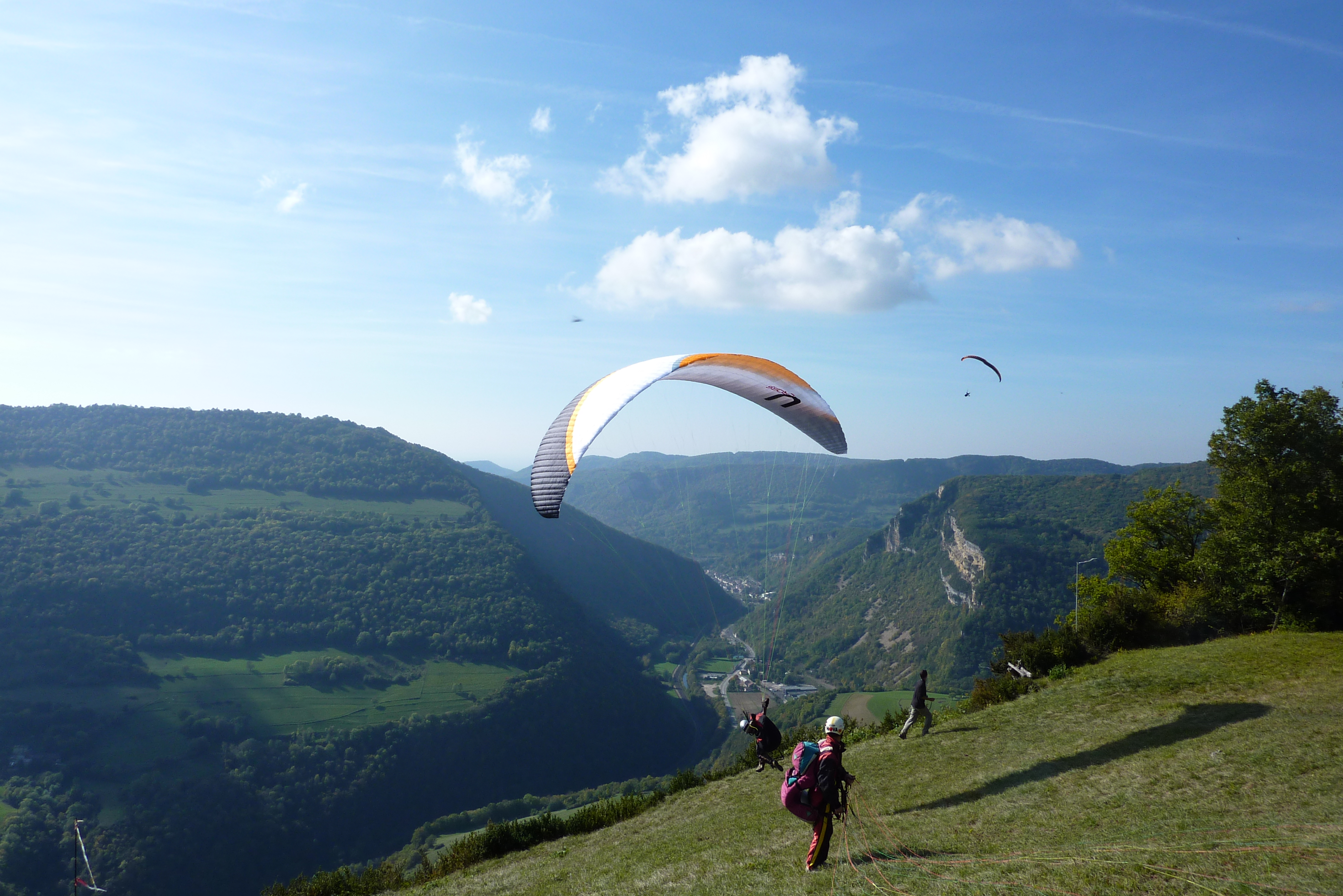 Air de décollage de parapente à Evosges